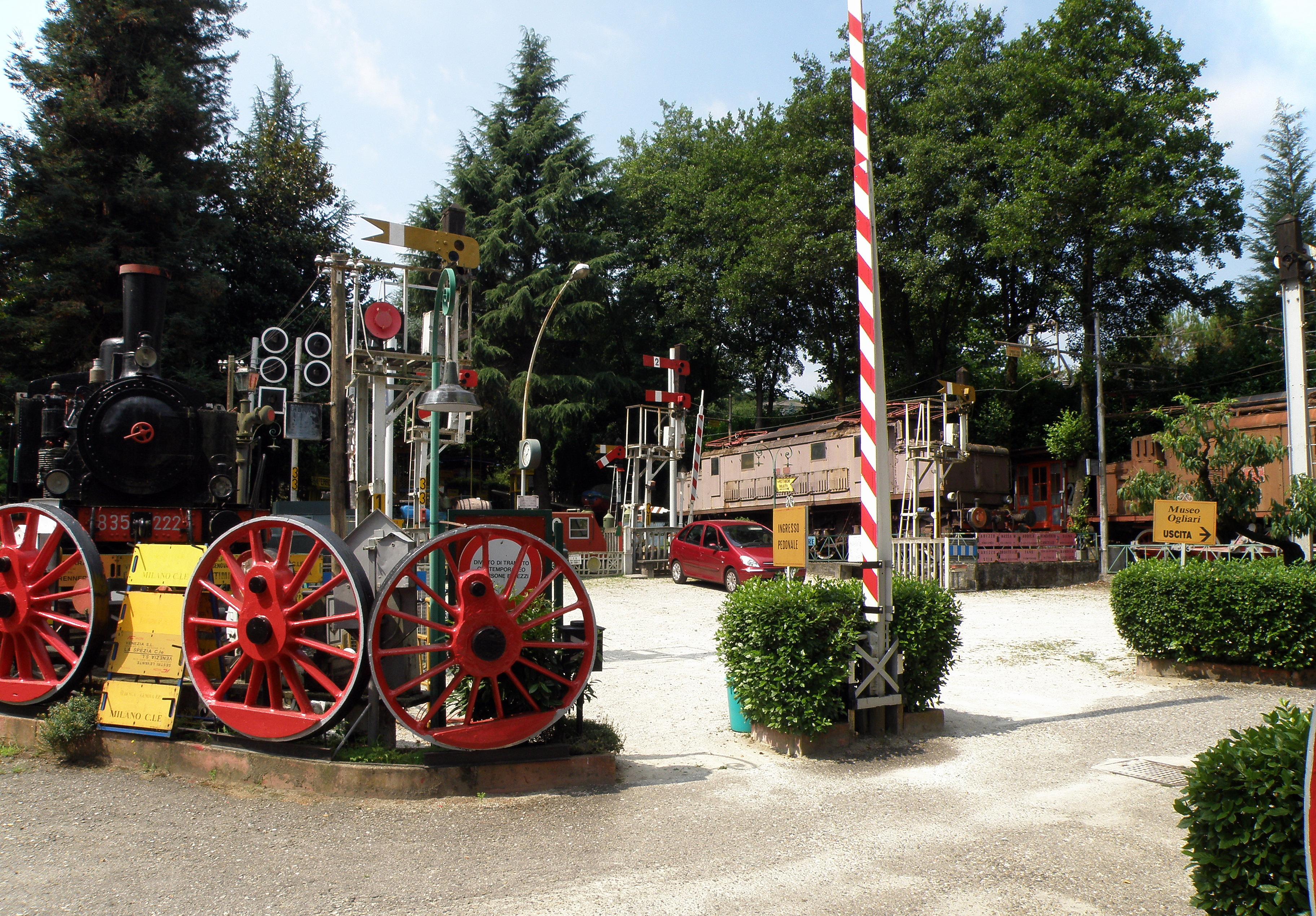 Musée des Transports Francesco Ogliari (en it. Museo europeo dei trasporti Ogliari), à Ranco, dans la prov. lombarde de Varèse, sur la rive orientale du lac Majeur.